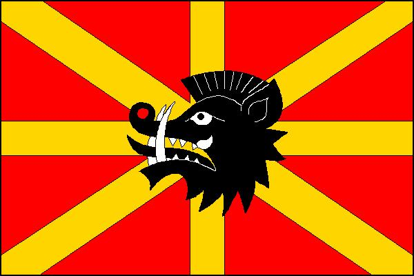 Vlajka obce Kunemil